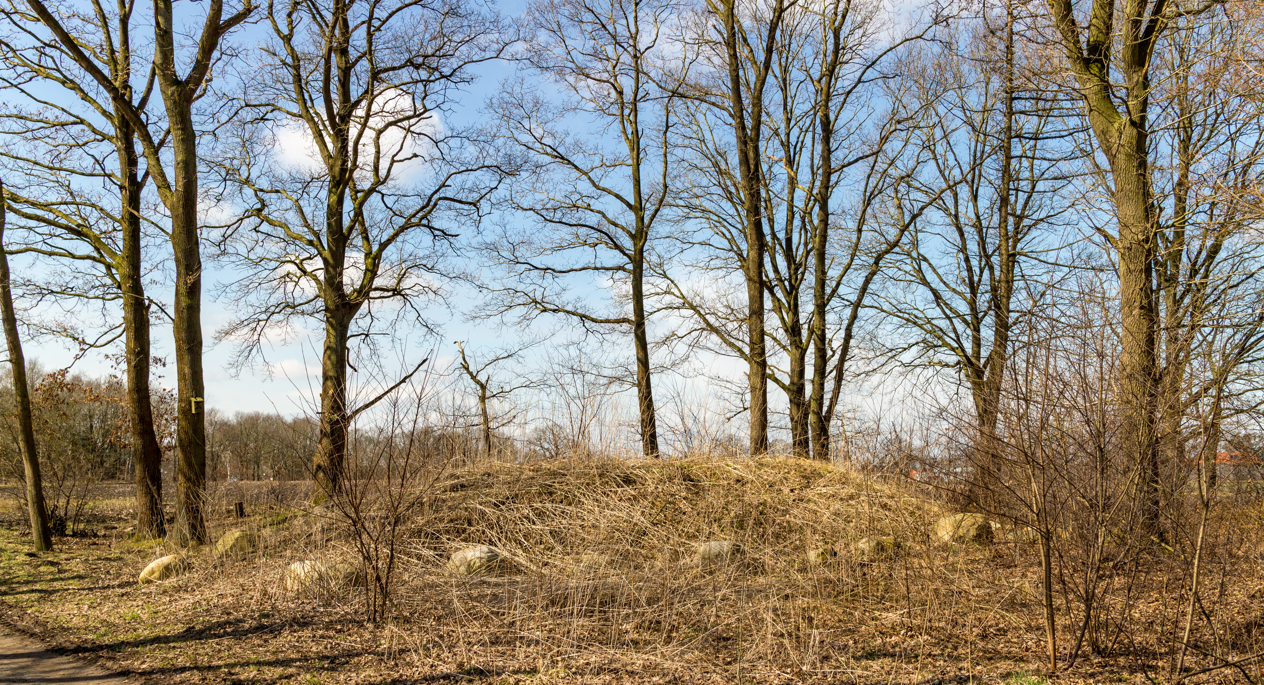 ehemalige Richstätte bei Stade